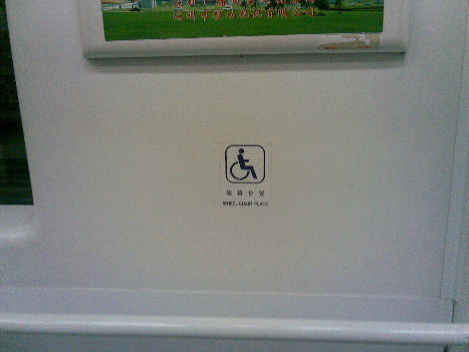 輪椅座位